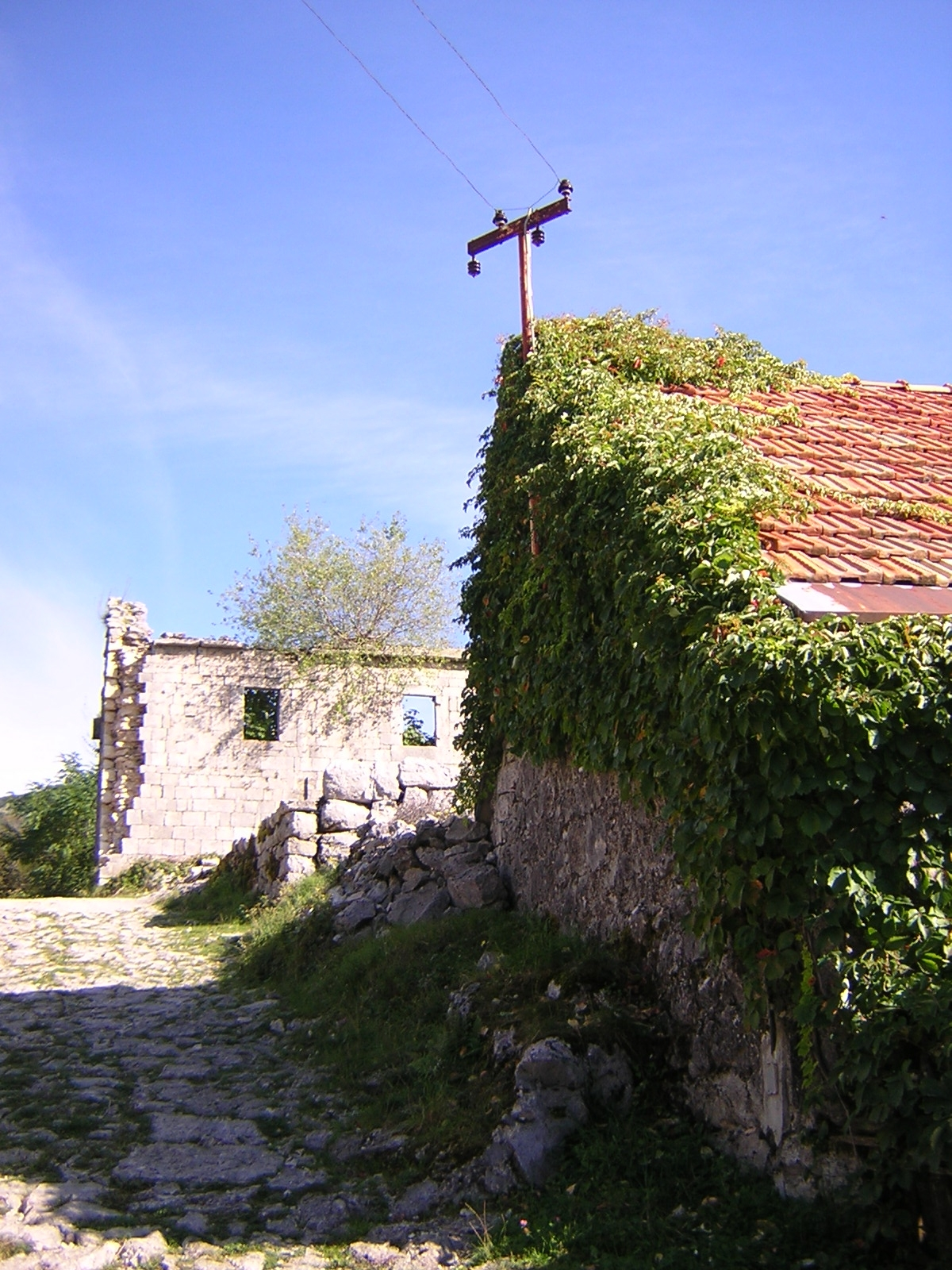 Njeguši